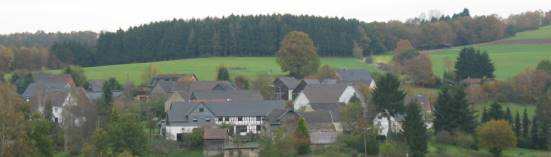 Blick auf Birkenbach, Gemeinde Nümbrecht